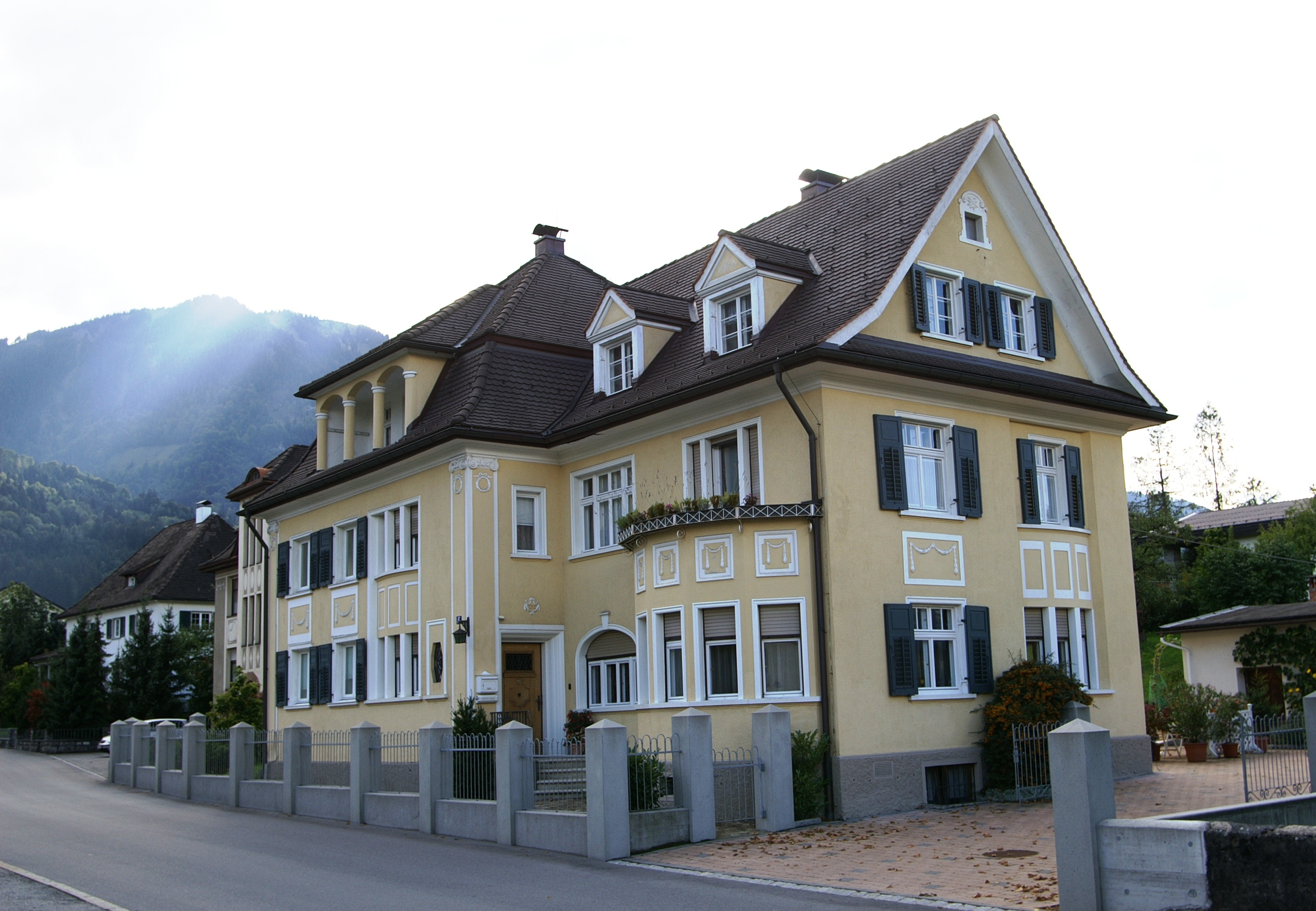 aus dem DEHIO Vorarlberg 1983: Nr.17 Villa Schallert. Heimatstil, Umbau Willibald Braun, 1922/23, kubischer Baukörper, Mansardwalmdach, polygonale Altane, arkadierte Dachöffnung, historisierender Jugendstilputz. *** Auftraggeber: Ferdinand Schallert, Fabrikant in Nenzing, Vorarlberg.